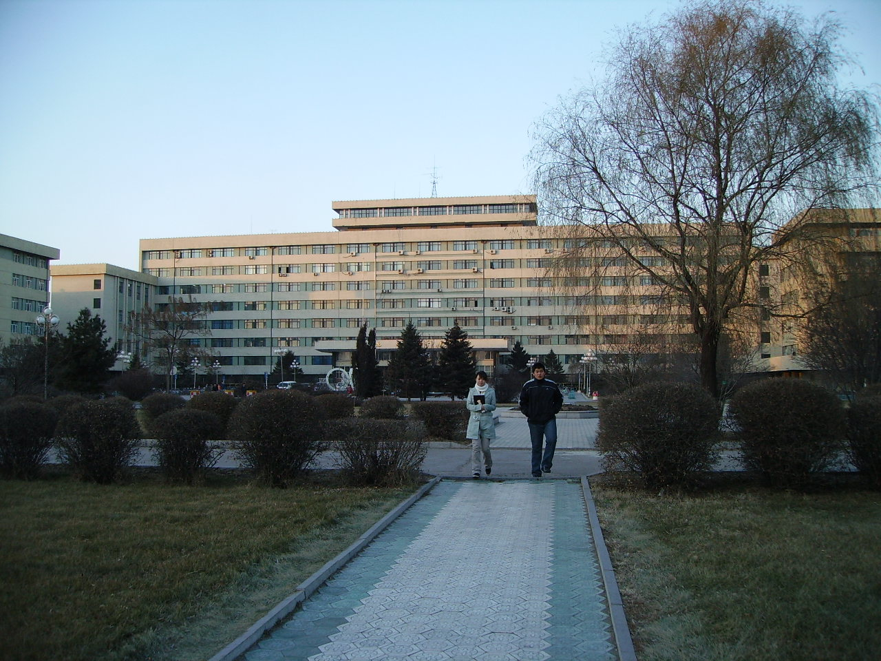 此照片为本人在东农院内所拍。--Realwonder 13:53:34 2005年11月29日 (UTC)